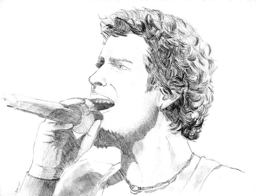 Portrait of Chris_Cornell. Orginal description: 2005. Es de una foto de Chris Cornell. Quise probar de hacer una cara con alguna expresión.